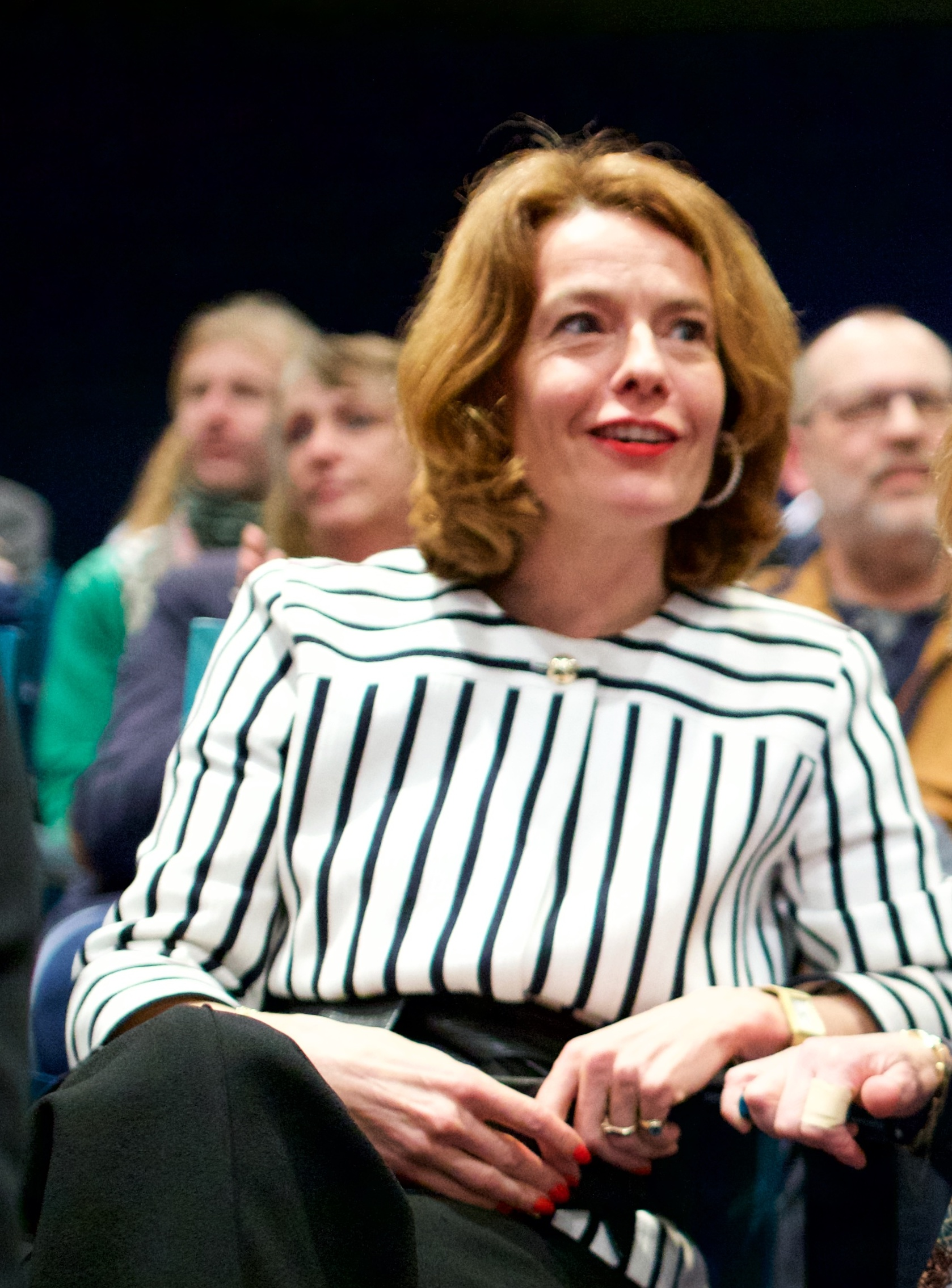 Op 1 april 2016 vond de slotmanifestatie van het project "Vanuit Autisme Bekeken".